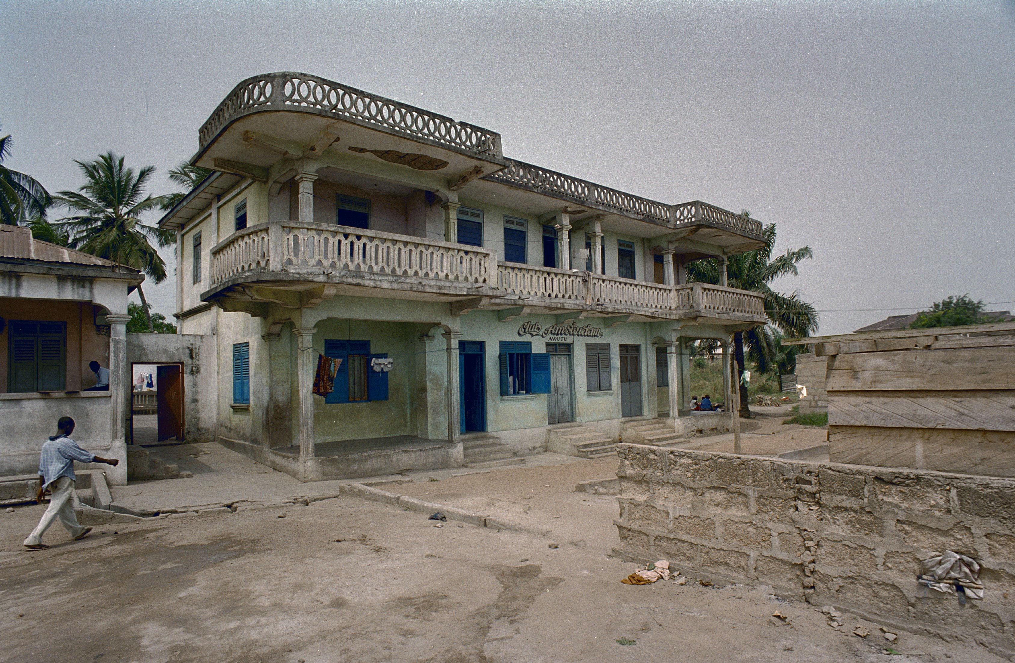 Club Amsterdam: Overzicht voorgevel en linker zijgevel (opmerking: Ghana reis Loek Tangel)